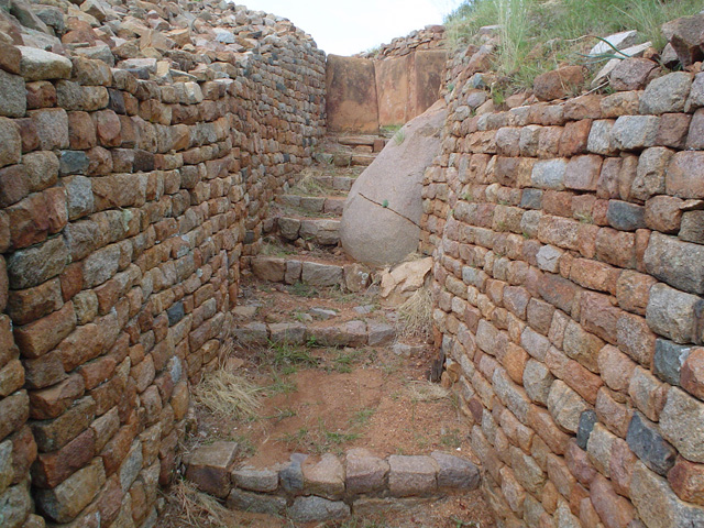 Khami ruins